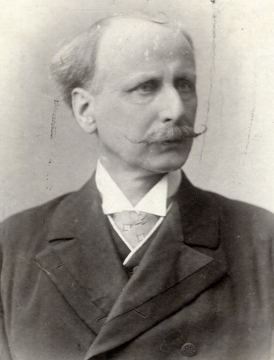 Aloys von Liechtenstein (1846 - 1920), Rakouský šlechtic a politik.